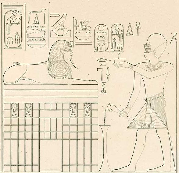 Thutmose IV. před sfingou; Stéla sfingy, Gíza